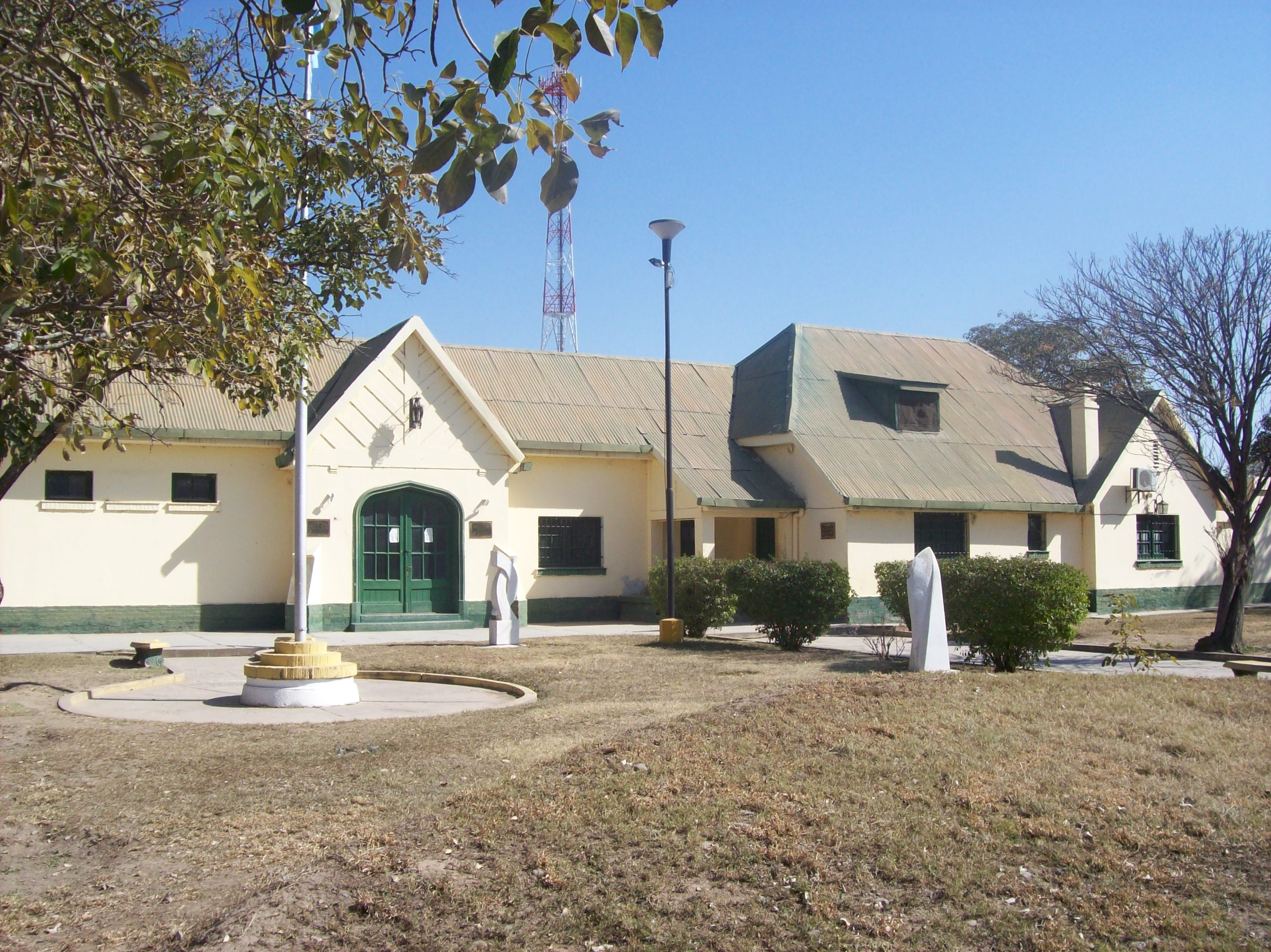 Frente del edificio de la ex-estación Termas de Río Hondo, clausurado en 1977 y desde 1999 museo municipal, ubicado en esta ciudad de la provincia de Santiago del Estero, Argentina.